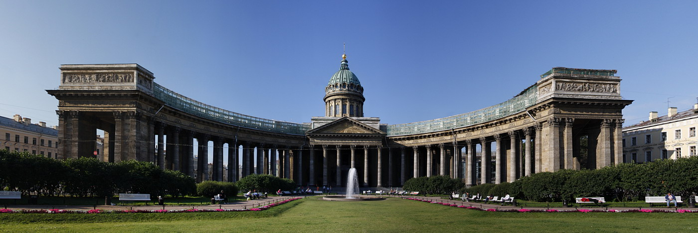 Панорама Казанского собора в г.Санкт-Петербурге.